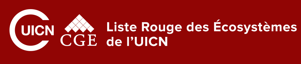 LRE - Produit de connaissance de l´UICN / CGE